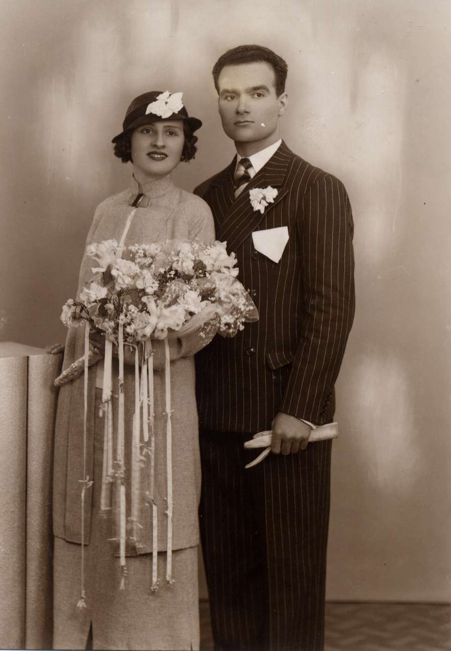 Trajes de boda de principios del siglo XX (1935). Barcelona, España.